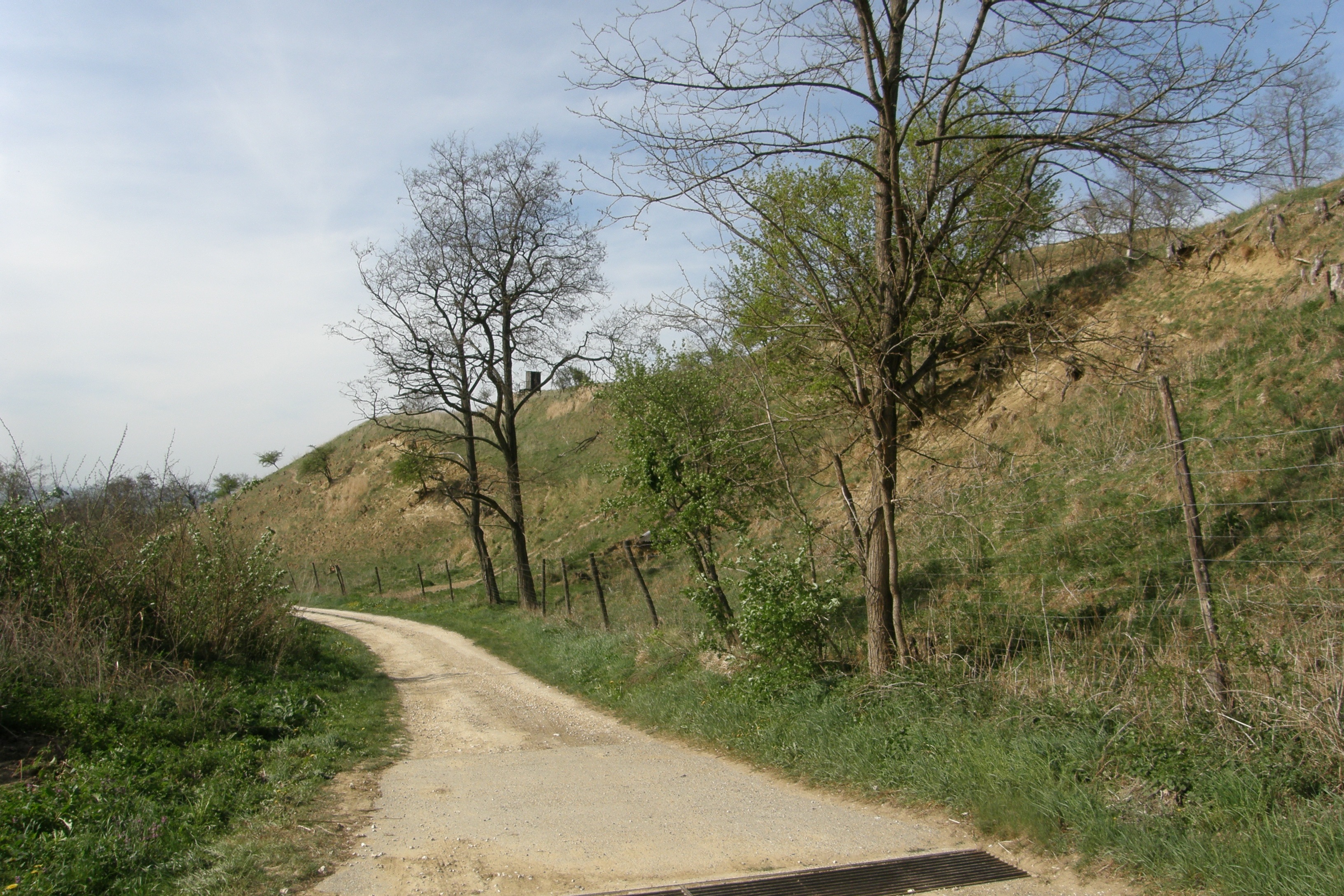 Hausberg Stronegg